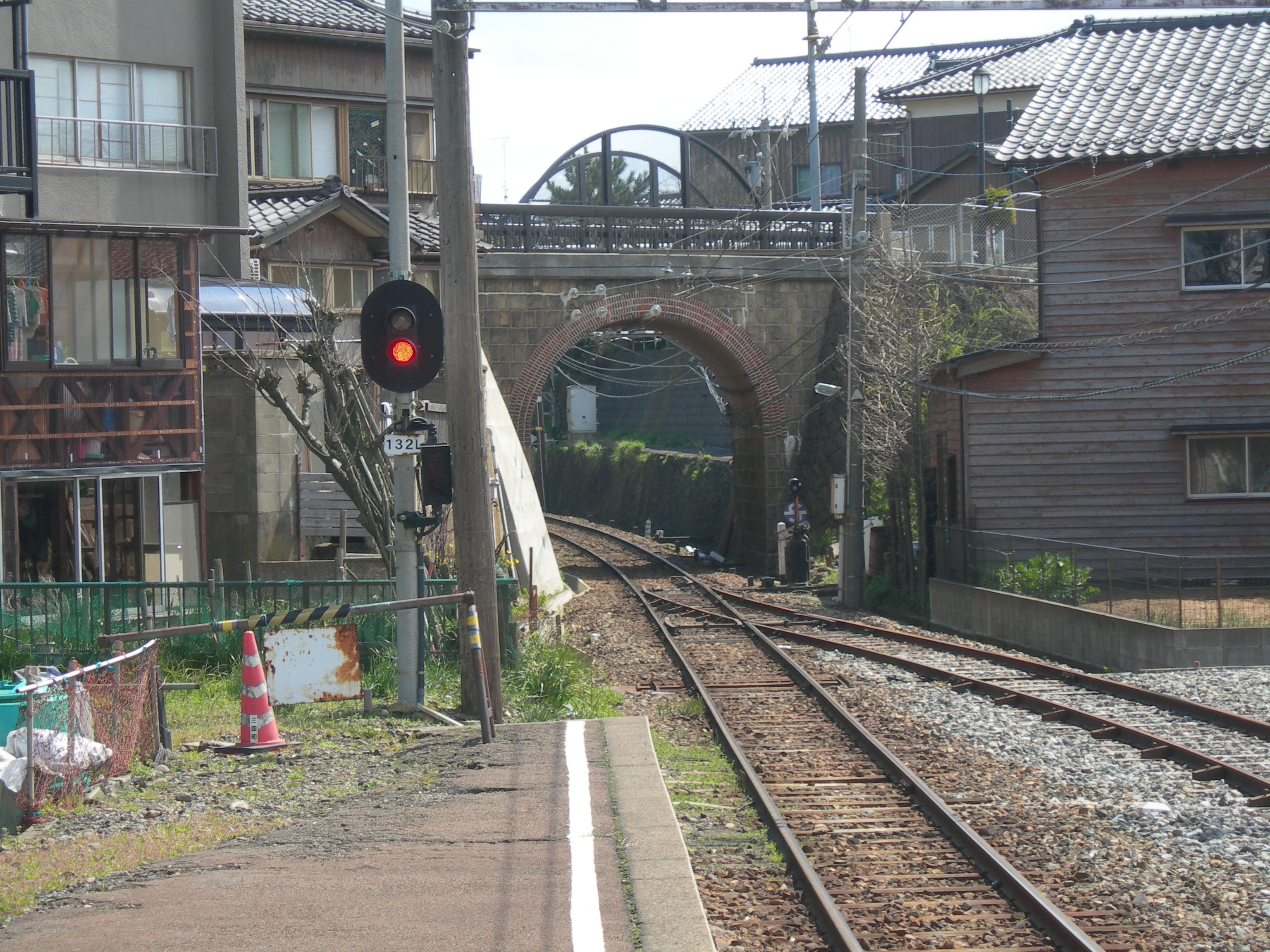 三国港駅ホーム